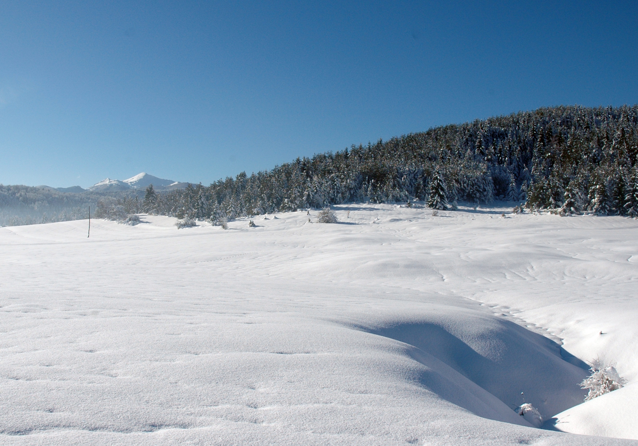 Pogled na Snežnik iz Babnega polja